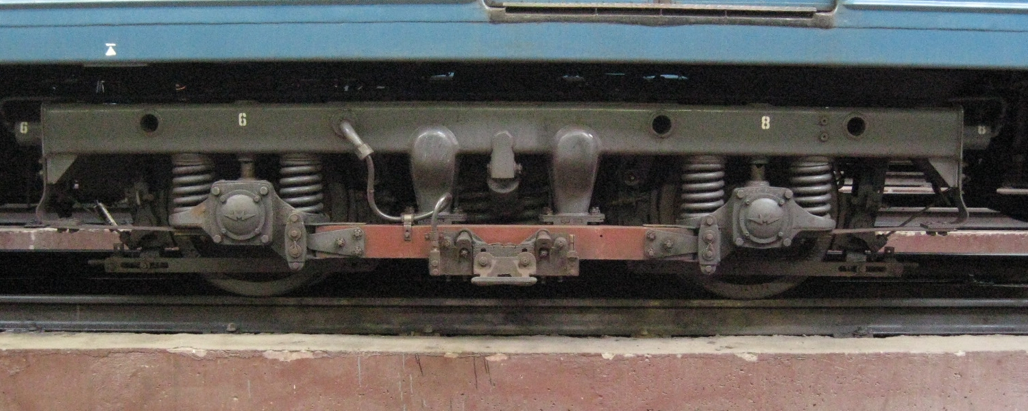 Вагон модели 81-714. Тележка с поводковой конструкцией буксового узла